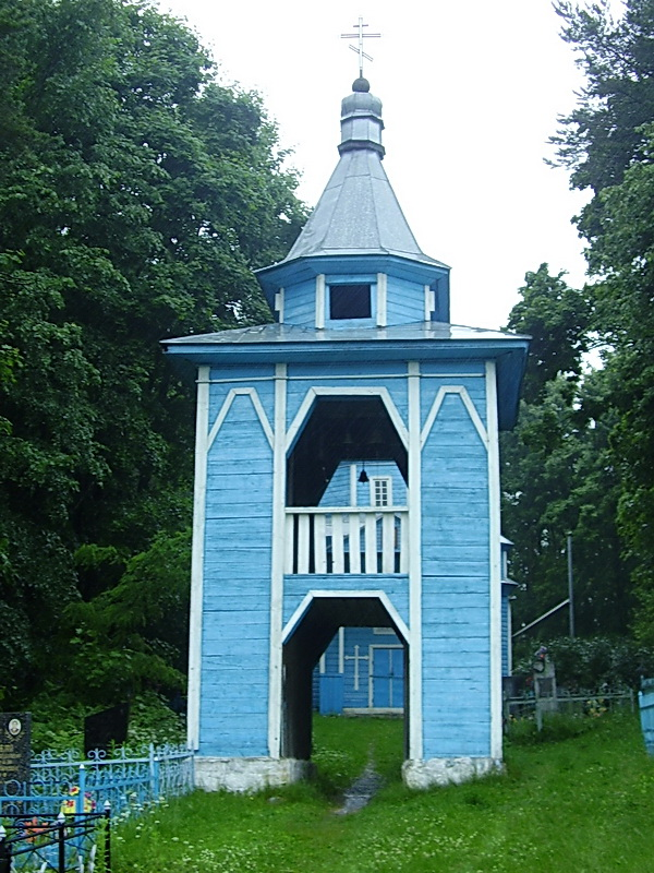 Галынка. Царква Св. Пятра і Паўла і брама-званіца